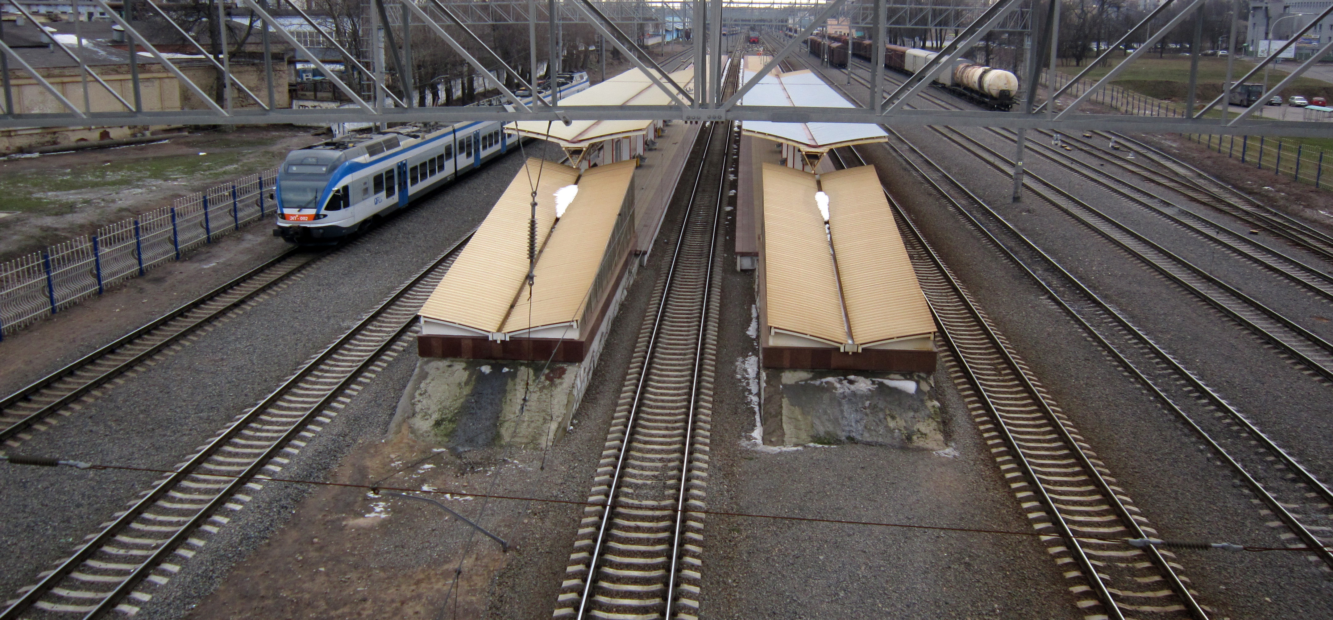 Станция Минск-Северный; виден электропоезд ЭПр